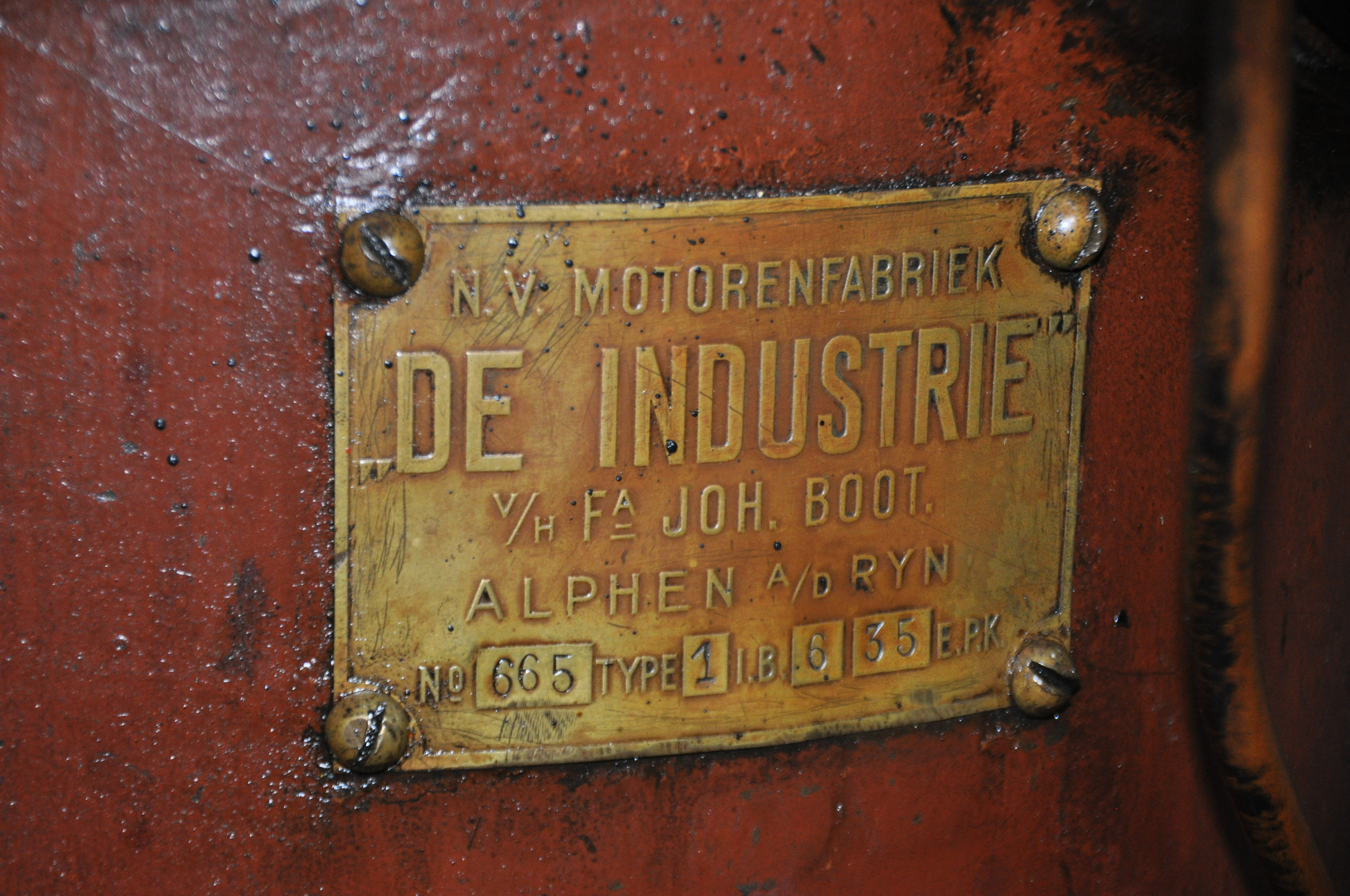 Een plaatje van de "De Industrie" motor van de Stella Maris. Het vermogen wordt aangegeven in E.P.K. in plaats van P.K.